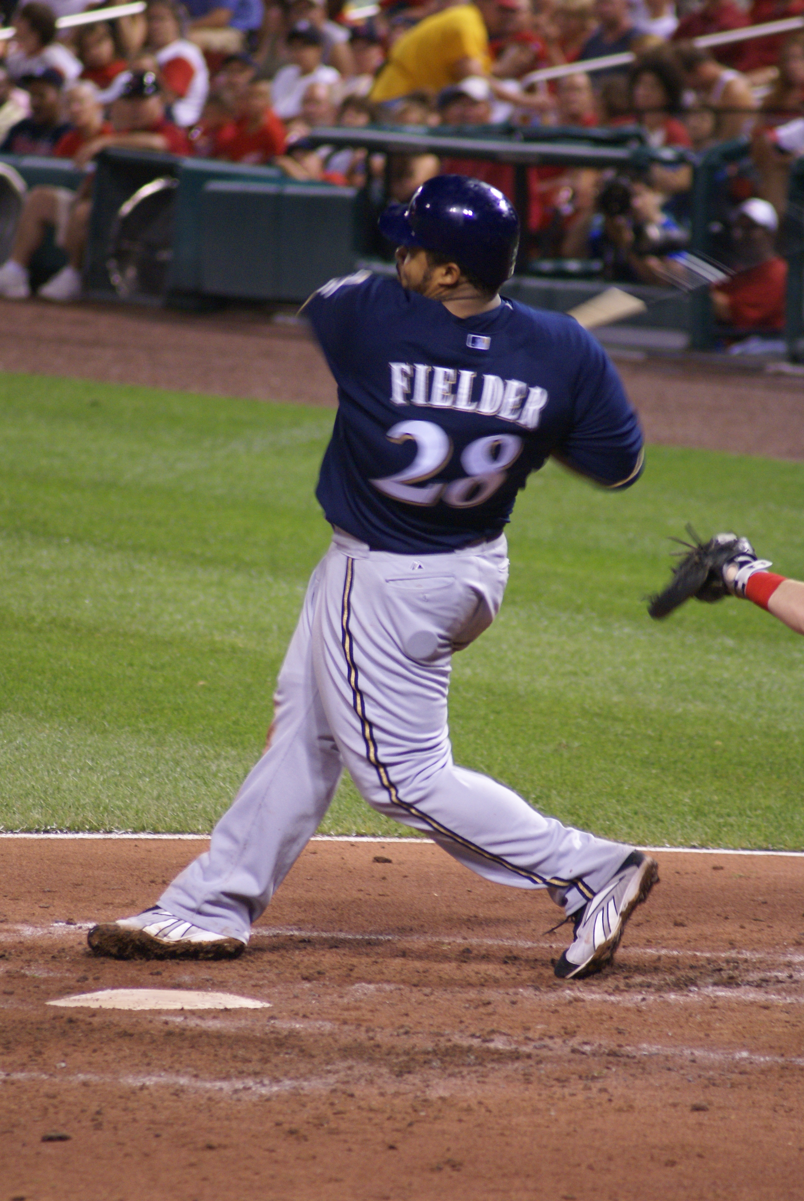 Prince Fielder